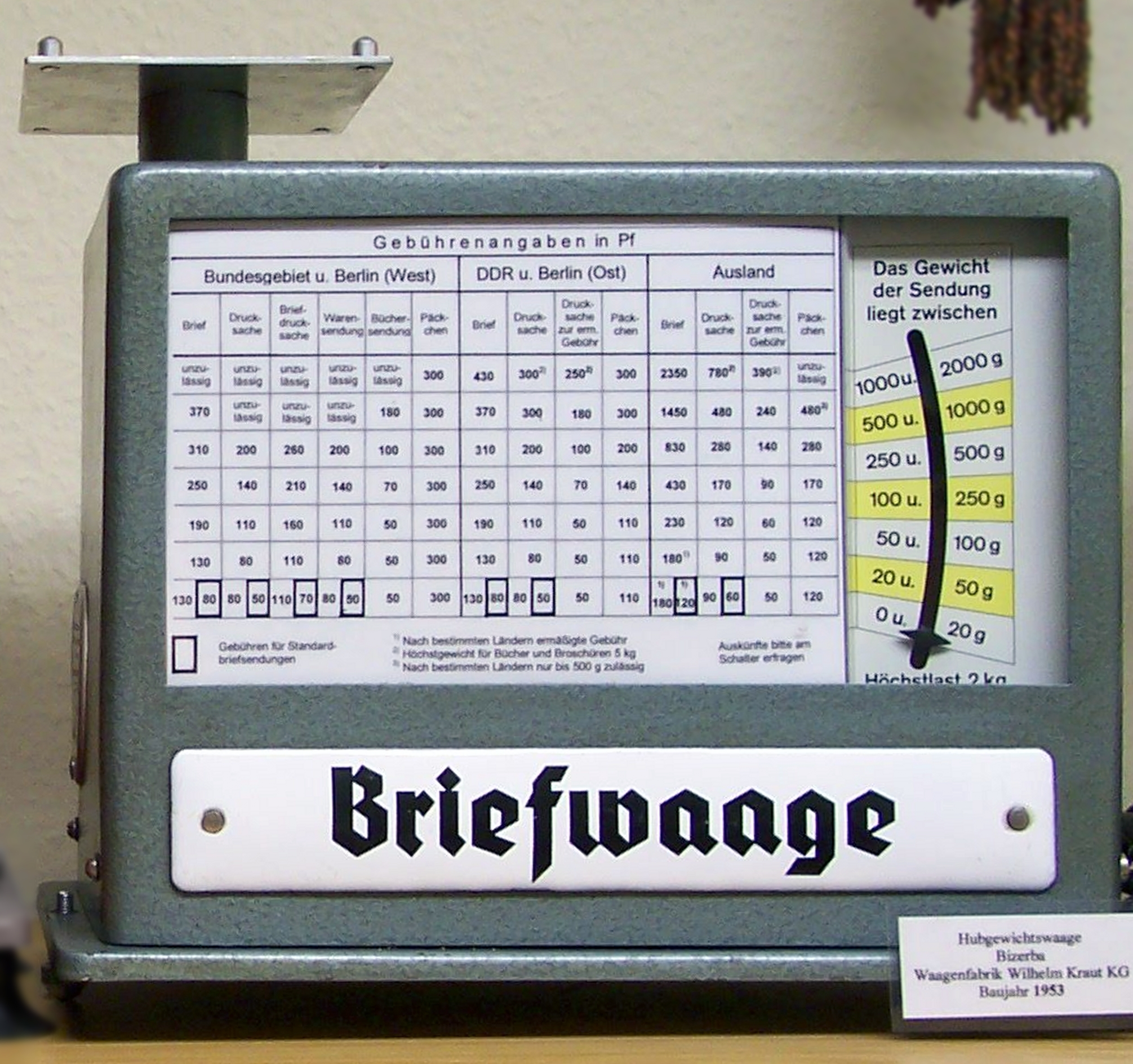 Hubgewichtsbriefwaage: Anfang der 1950er-Jahre Ort: Rheinhessisches Postmuseum in Erbes-Büdesheim